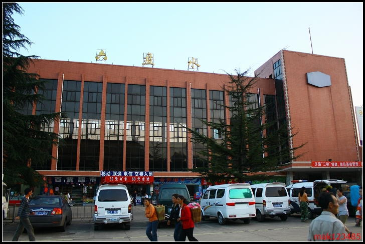 六盘水火车站